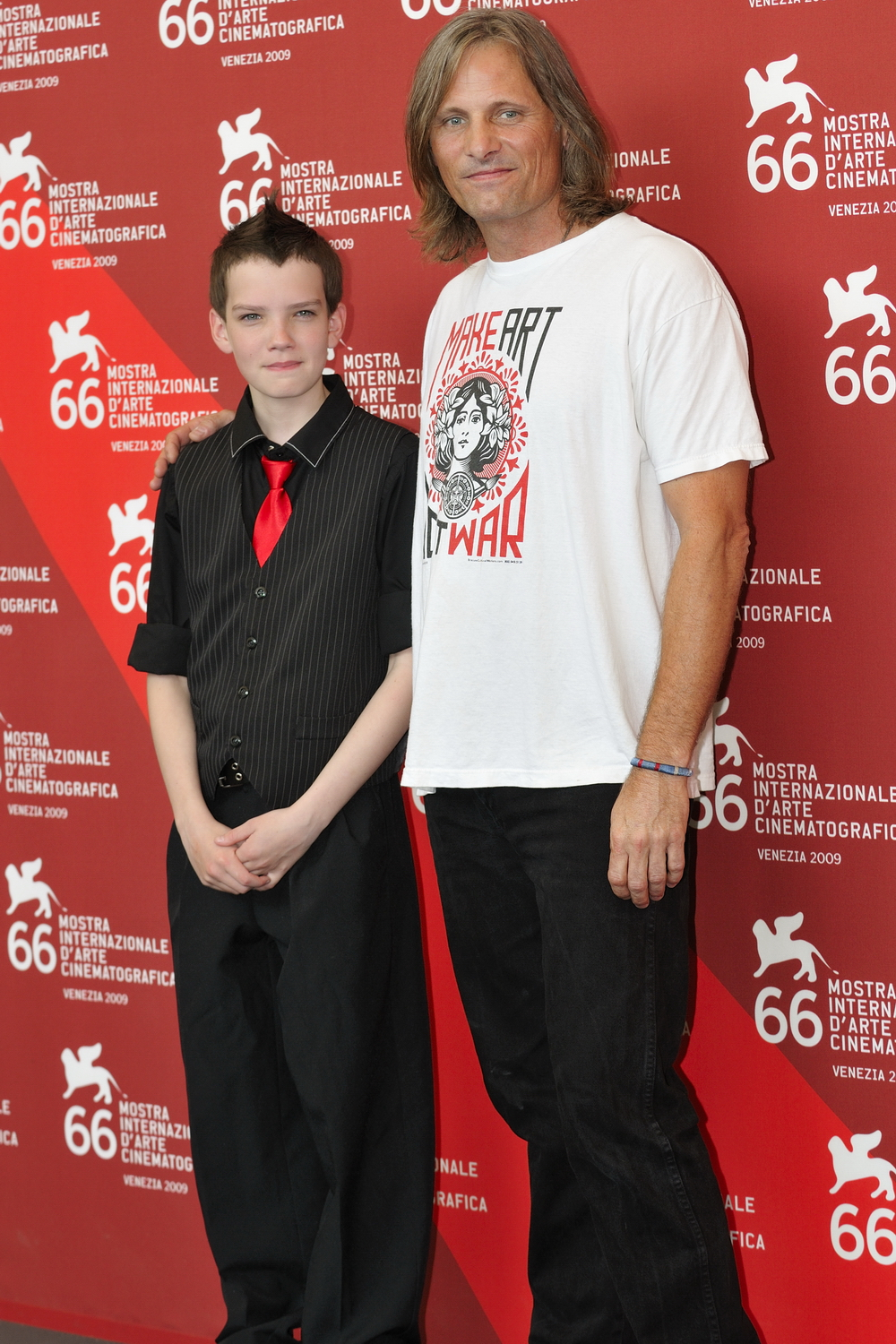 66ème Festival du Cinéma de Venise (Mostra), 2ème jour (03/09/2009) Photocall avec Viggo Mortensen pour le film : The Road